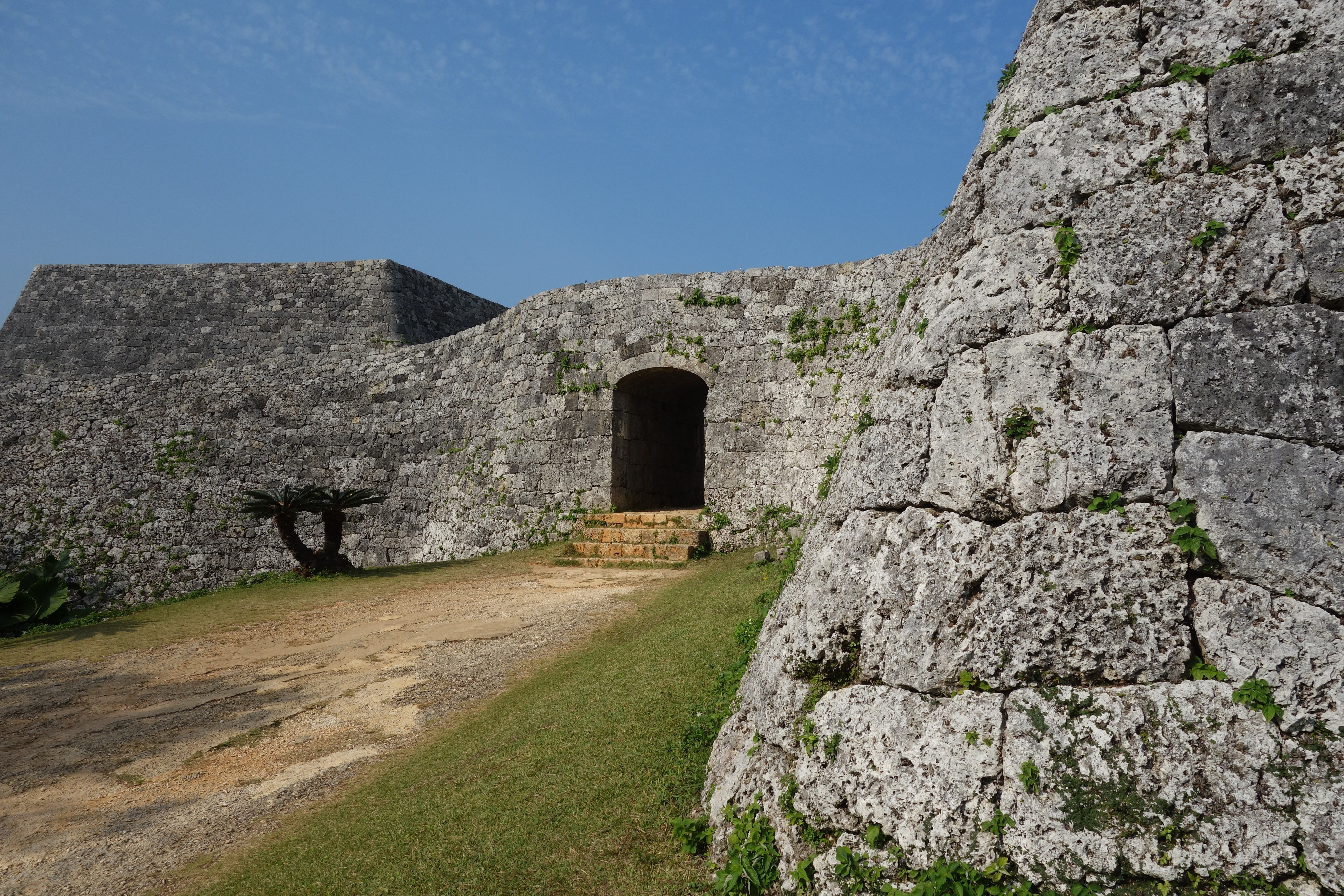 座喜味城趾